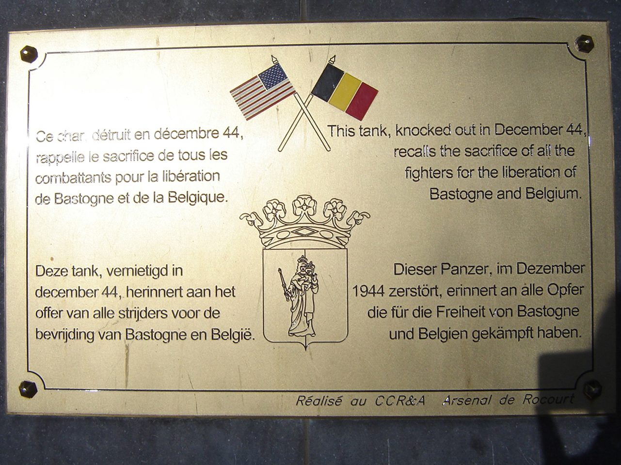 Plaquette herinnert aan de vernietiging van deze Shermantank - dec '44 BASTOGNE